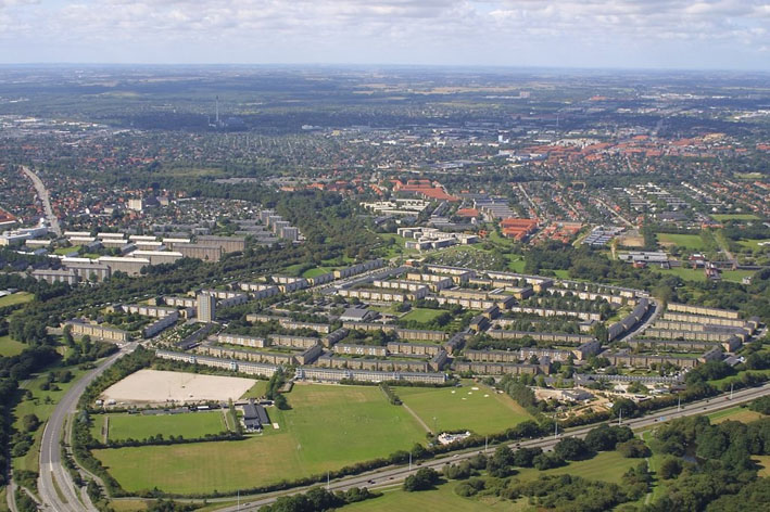 Tingbjerg set fra luften.